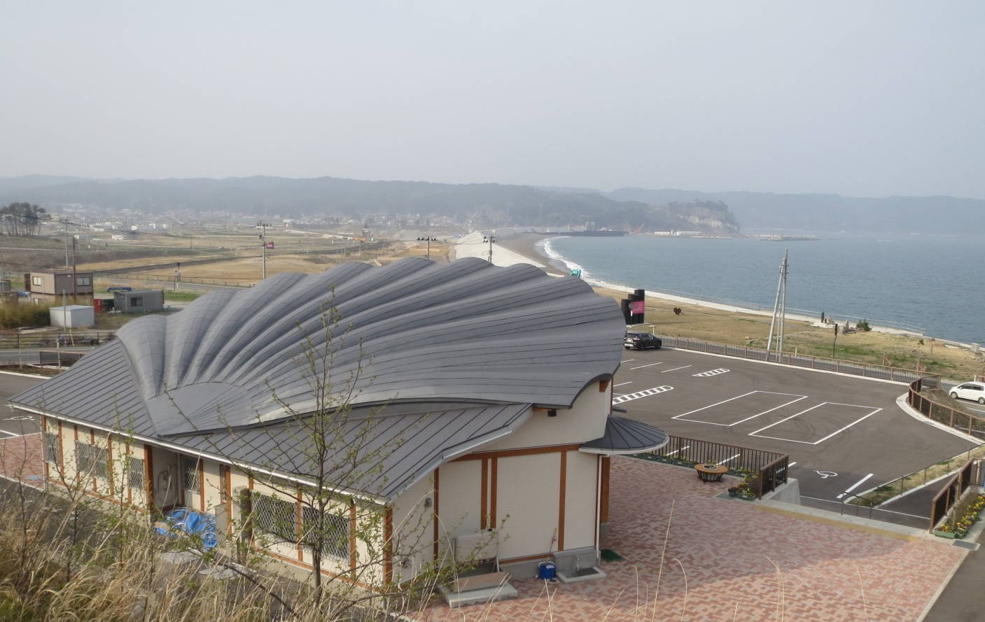 ほたてんぼうだいと十府ヶ浦海岸